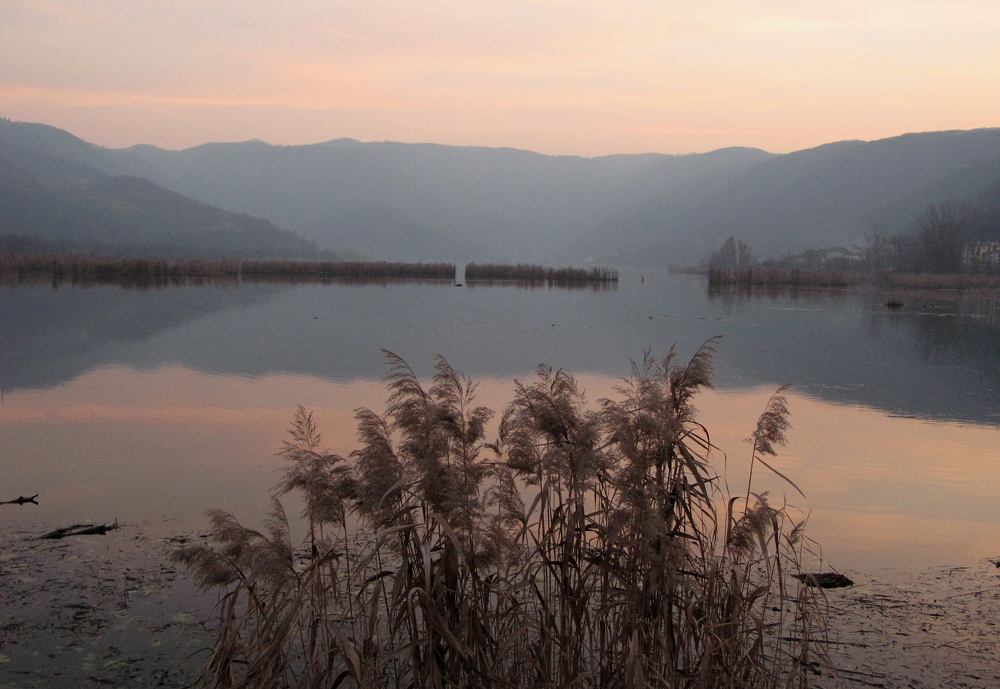 Rodolfo Rossi, privata, Arcugnano (VI) Italia " Il lago di Fimon visto al tramonto" pubblica